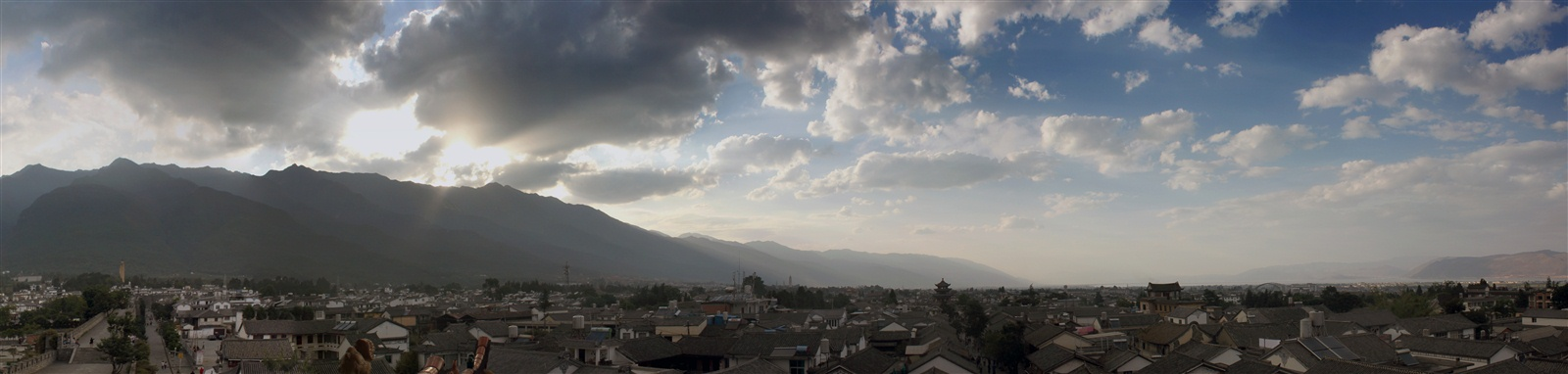 大理的暮色